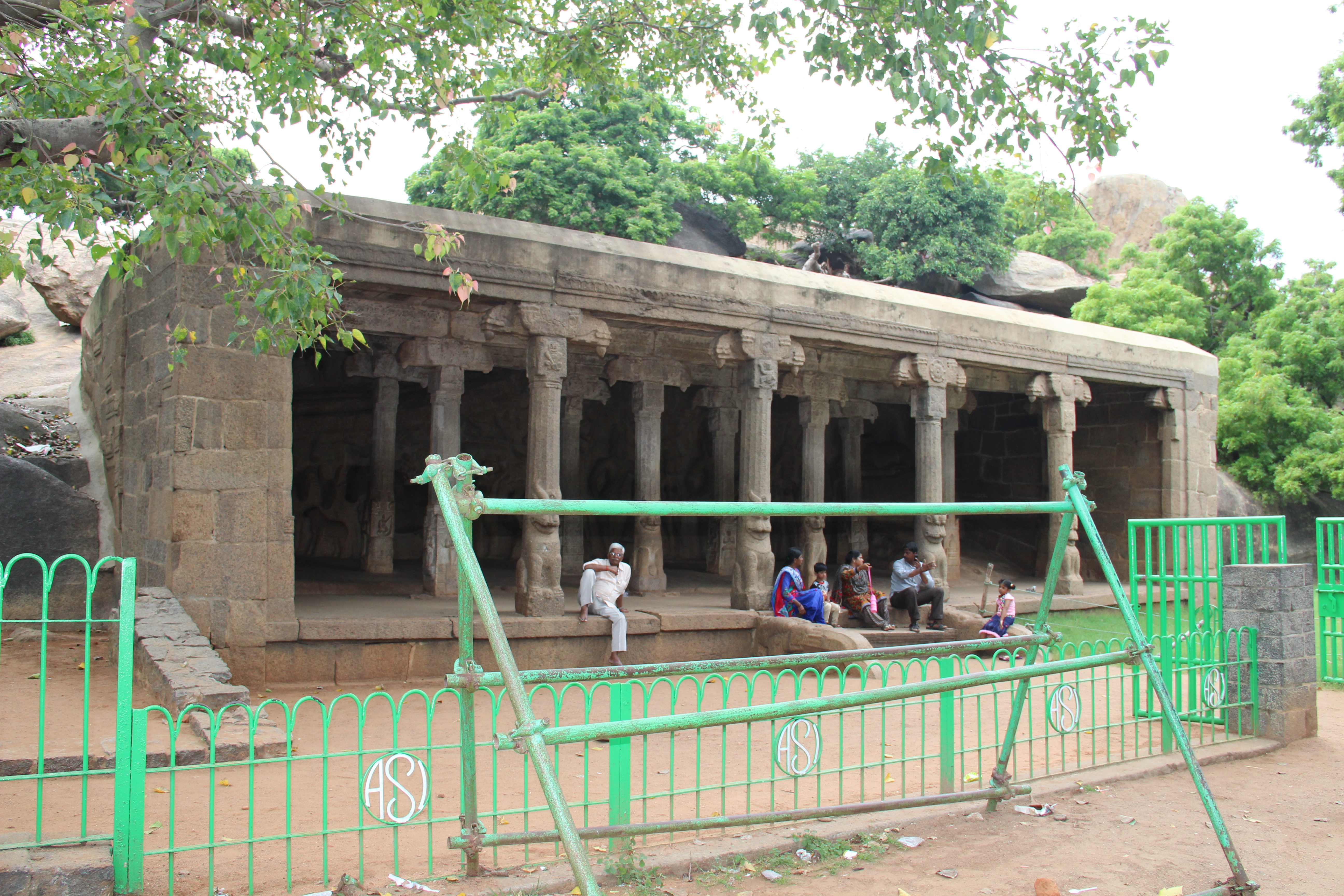 மாமல்லபுரத்திலுள்ள அருச்சுனன் தபசு பாறைக்கருகே உள்ள மண்டபம்.களம்: மாமல்லபுரம், தமிழ்நாடு, இந்திய ஒன்றியம்..